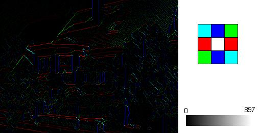 verbliebene Pixel (lokale Maxima) mit Richtungsangabe und Kantenstärke